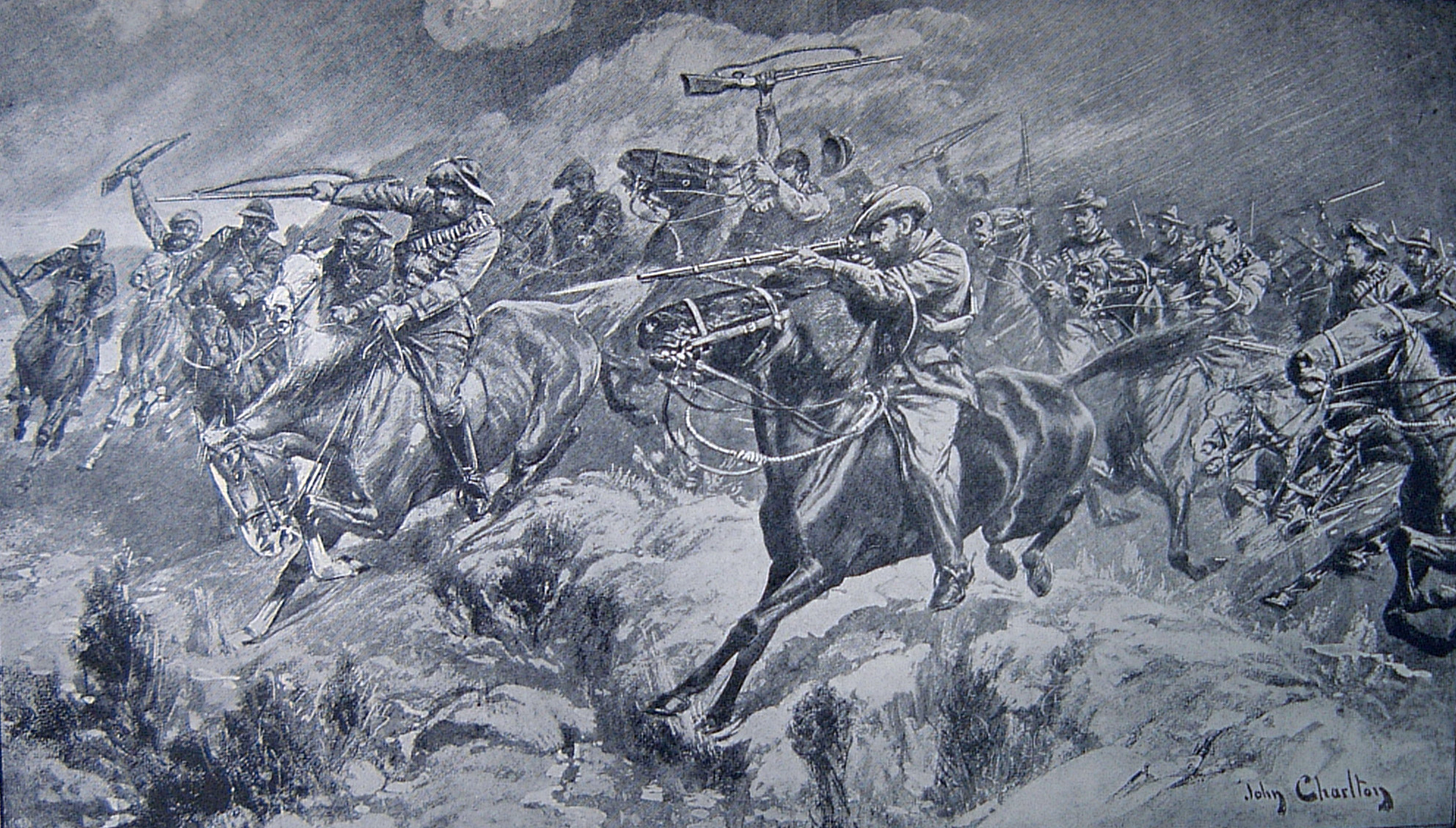 Bakenlaagte boer charge